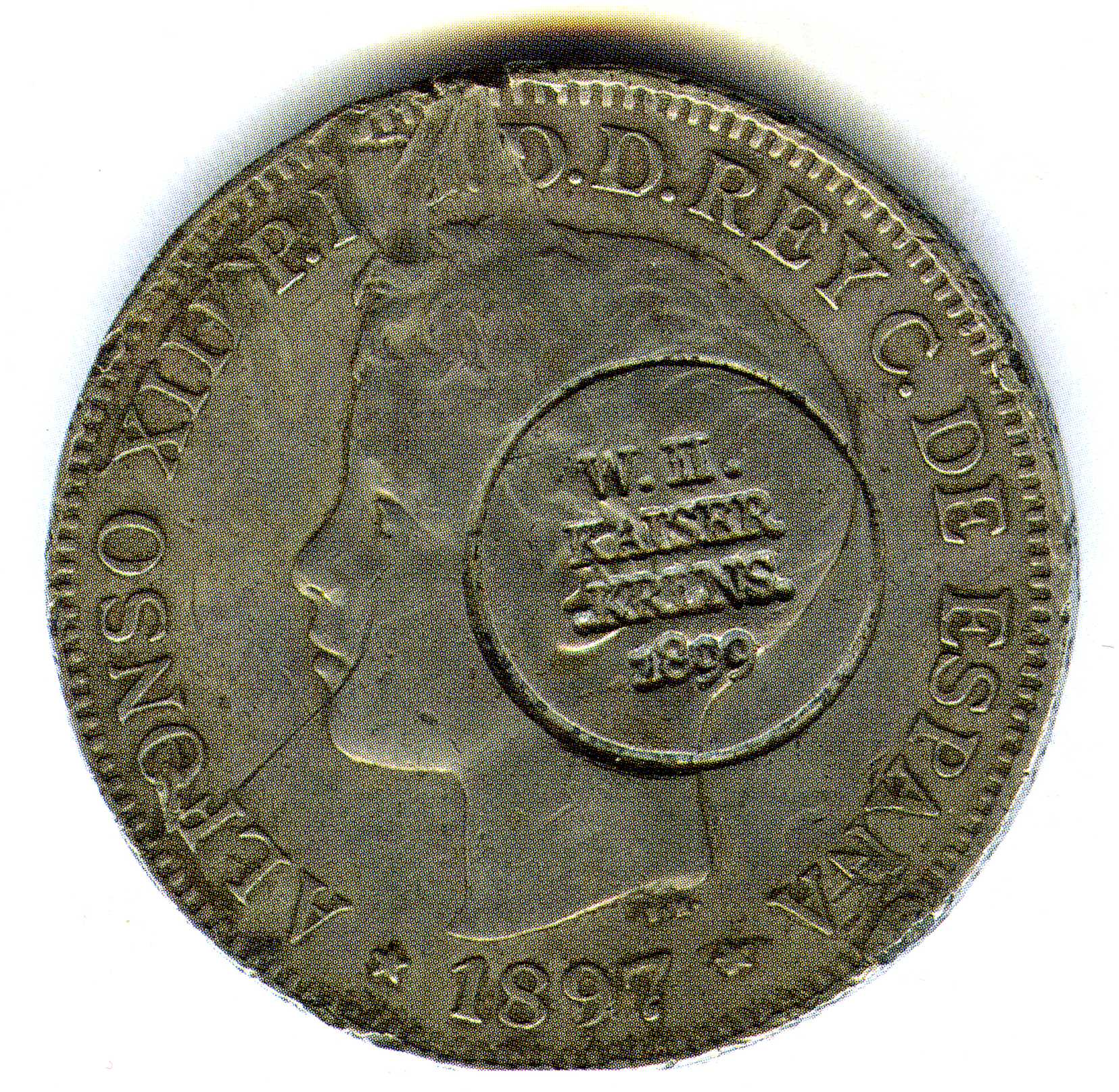 Moneda utilizada en las islas Carolinas